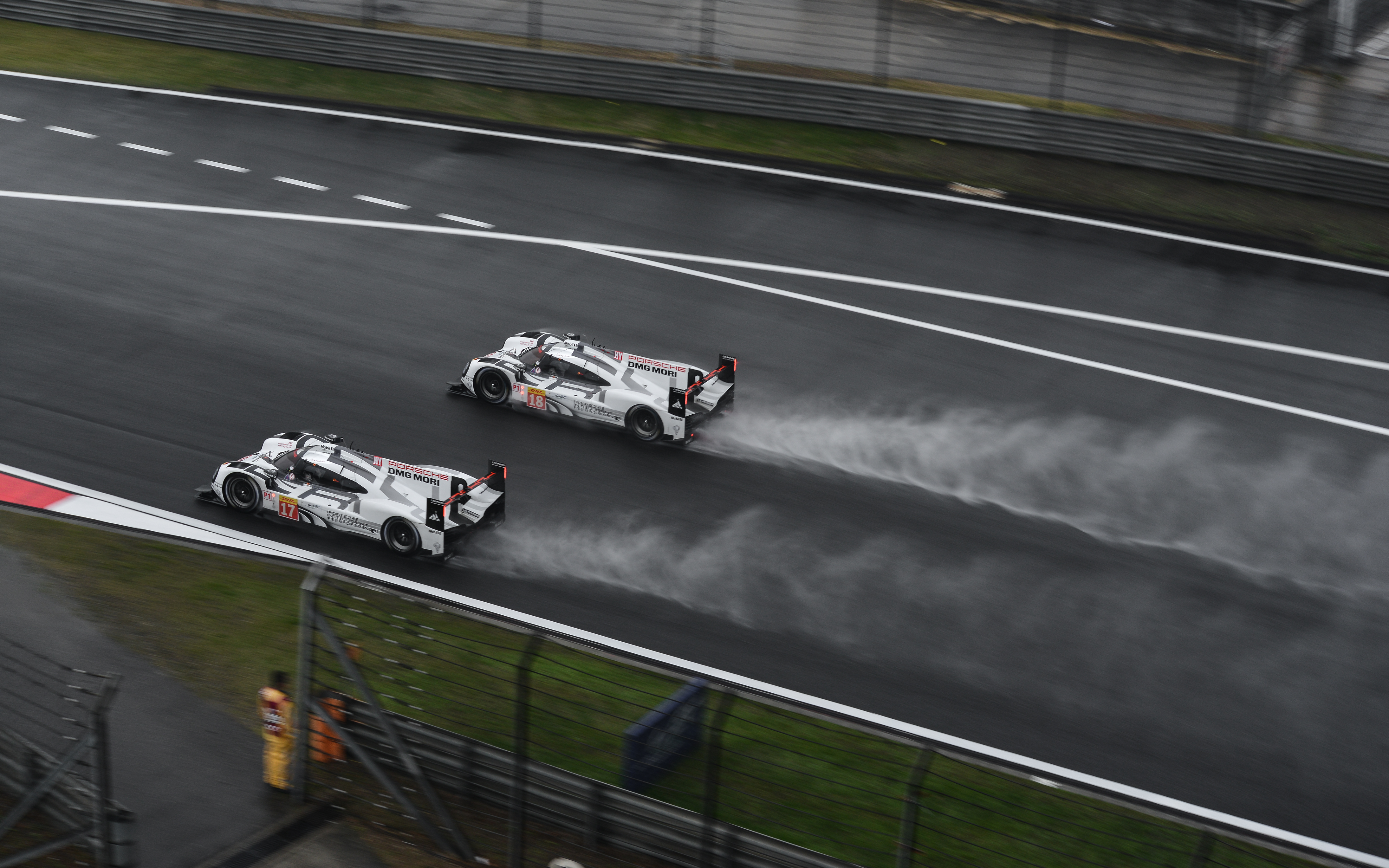 WEC, Shanghai, 2015